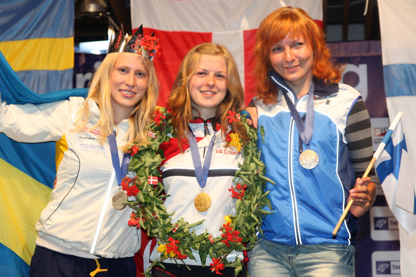 Winners of JWOC 2009 (Long) 1) Ida Bobach 2) Jenny Lönnkvist 3) Marika Teini